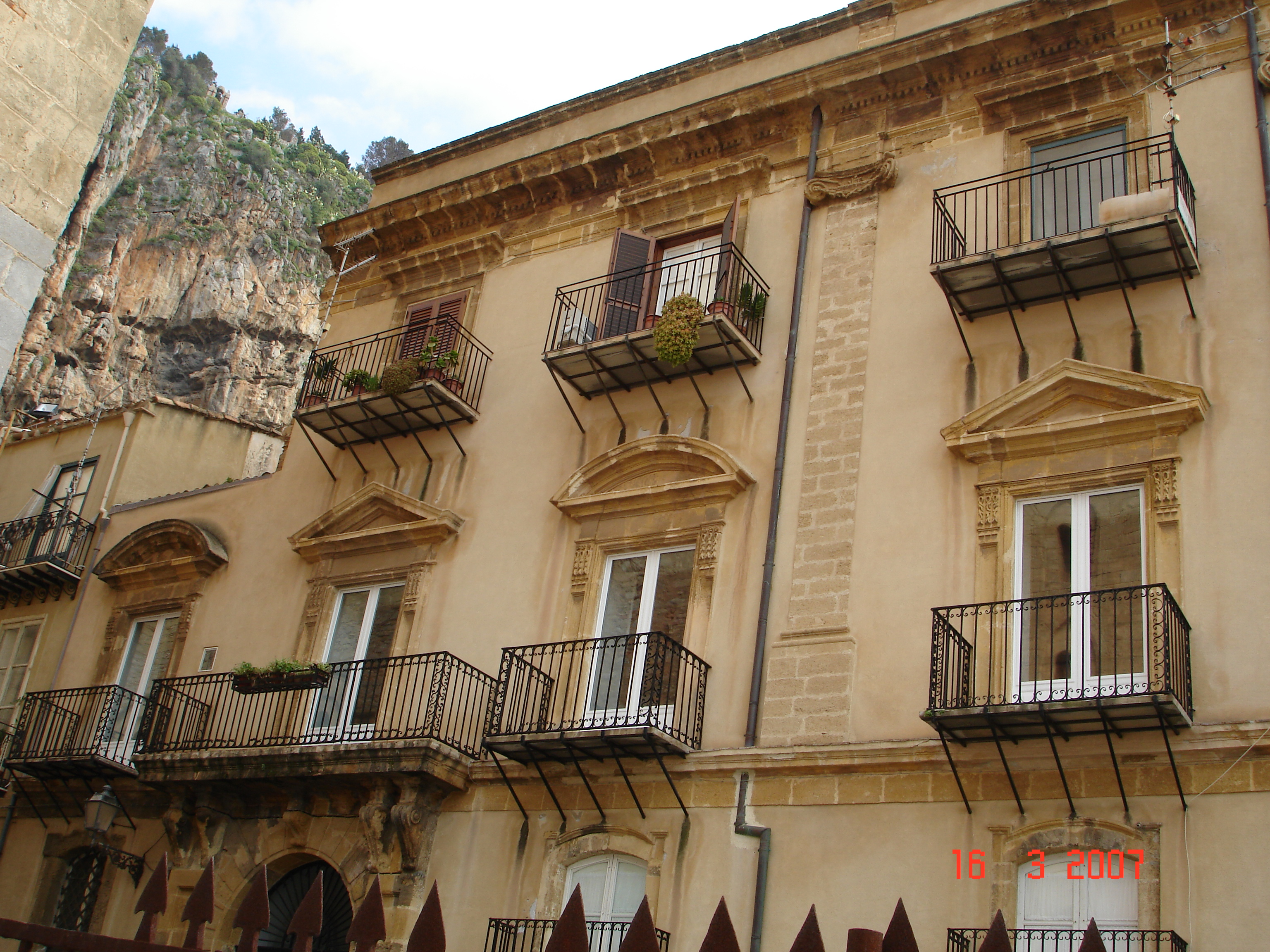 Palazzo Legambi a Cefalù Cortesemente offerta da Pascal Guercio